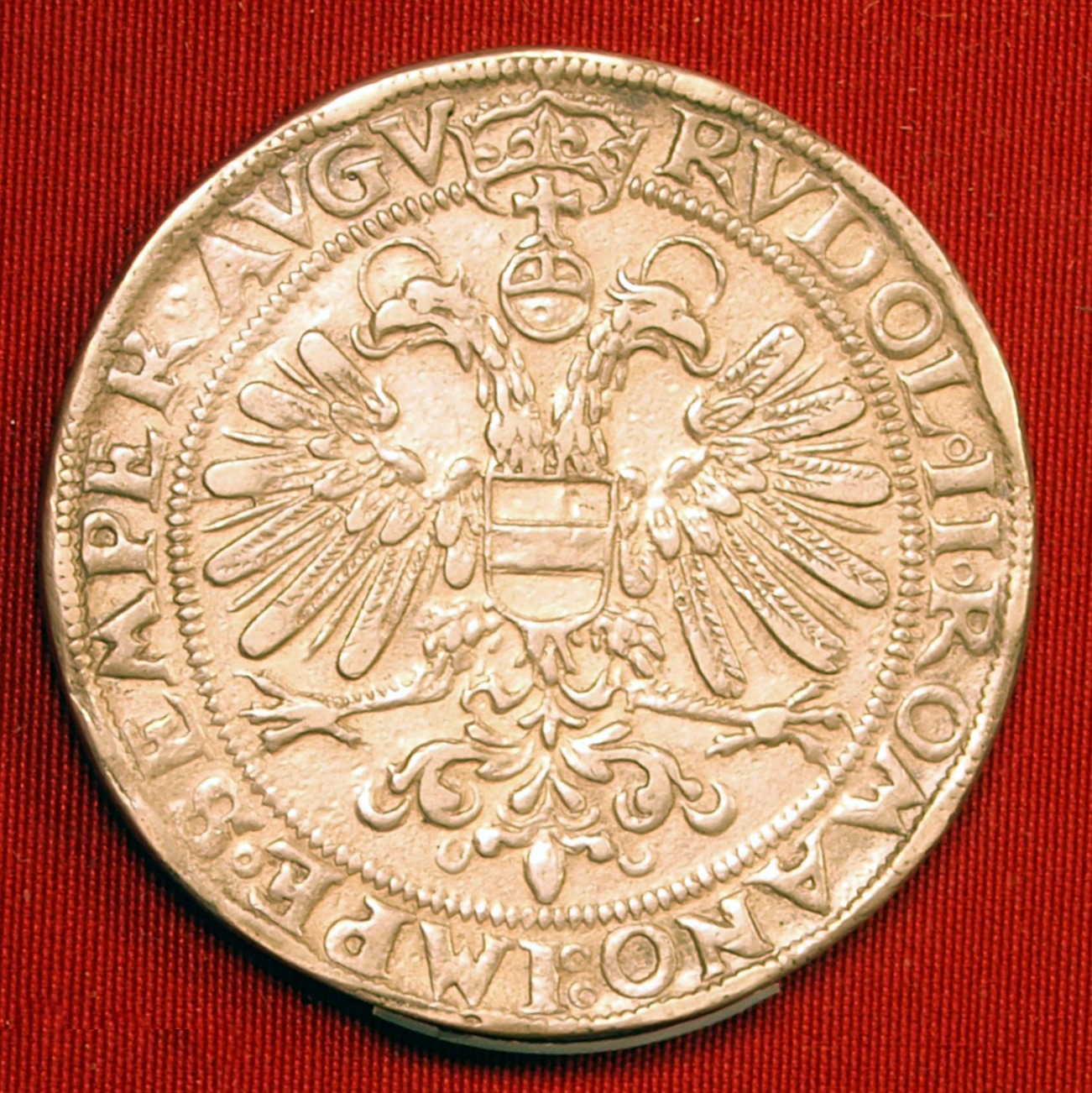 Groningen, rijksdaalder 1602.